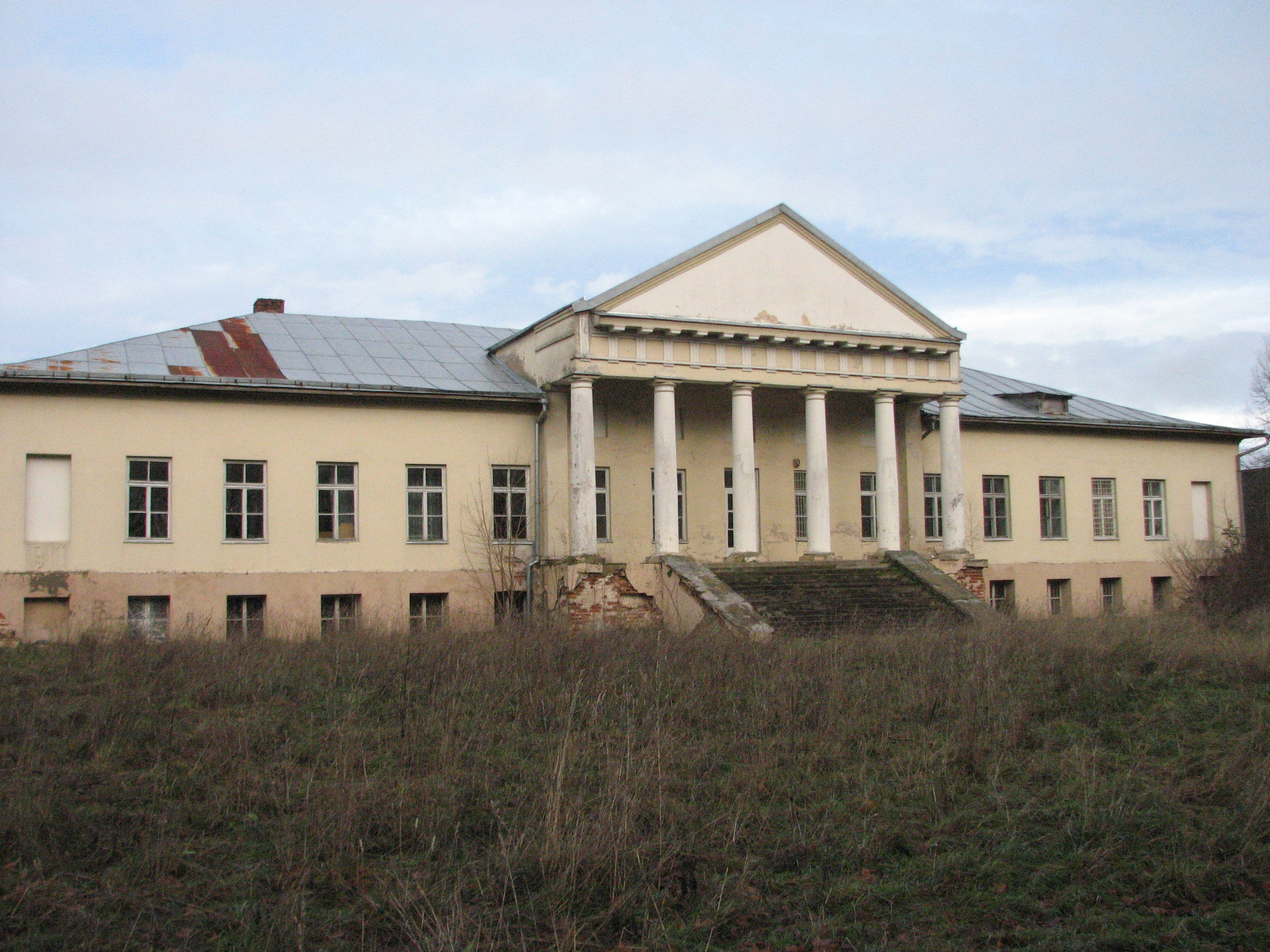 Buvusio Arnionių dvaro pastatas